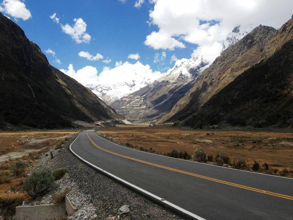 Ruta AN-107 - Quebrada Ulta